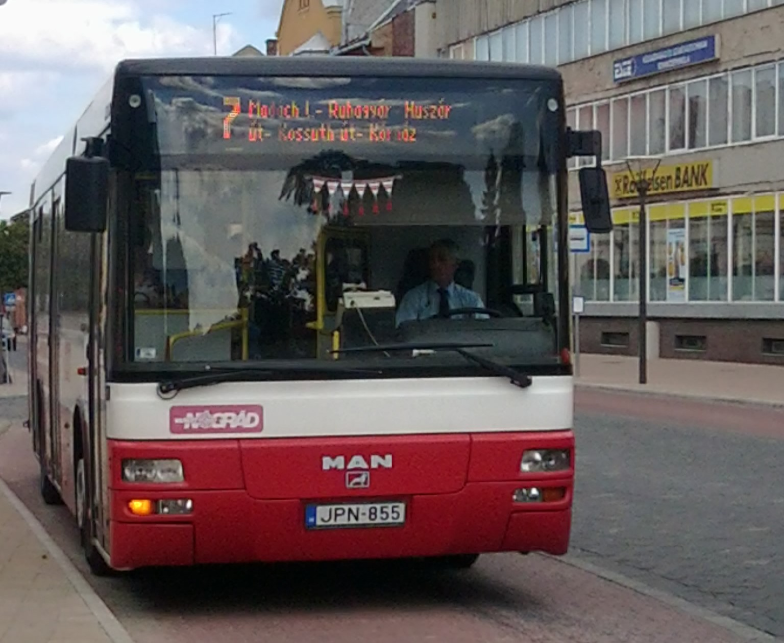 Egy MAN autóbusz a balassagyarmati Civitas Fortissima tér buszmegállóban, a 7-es busz vonalán